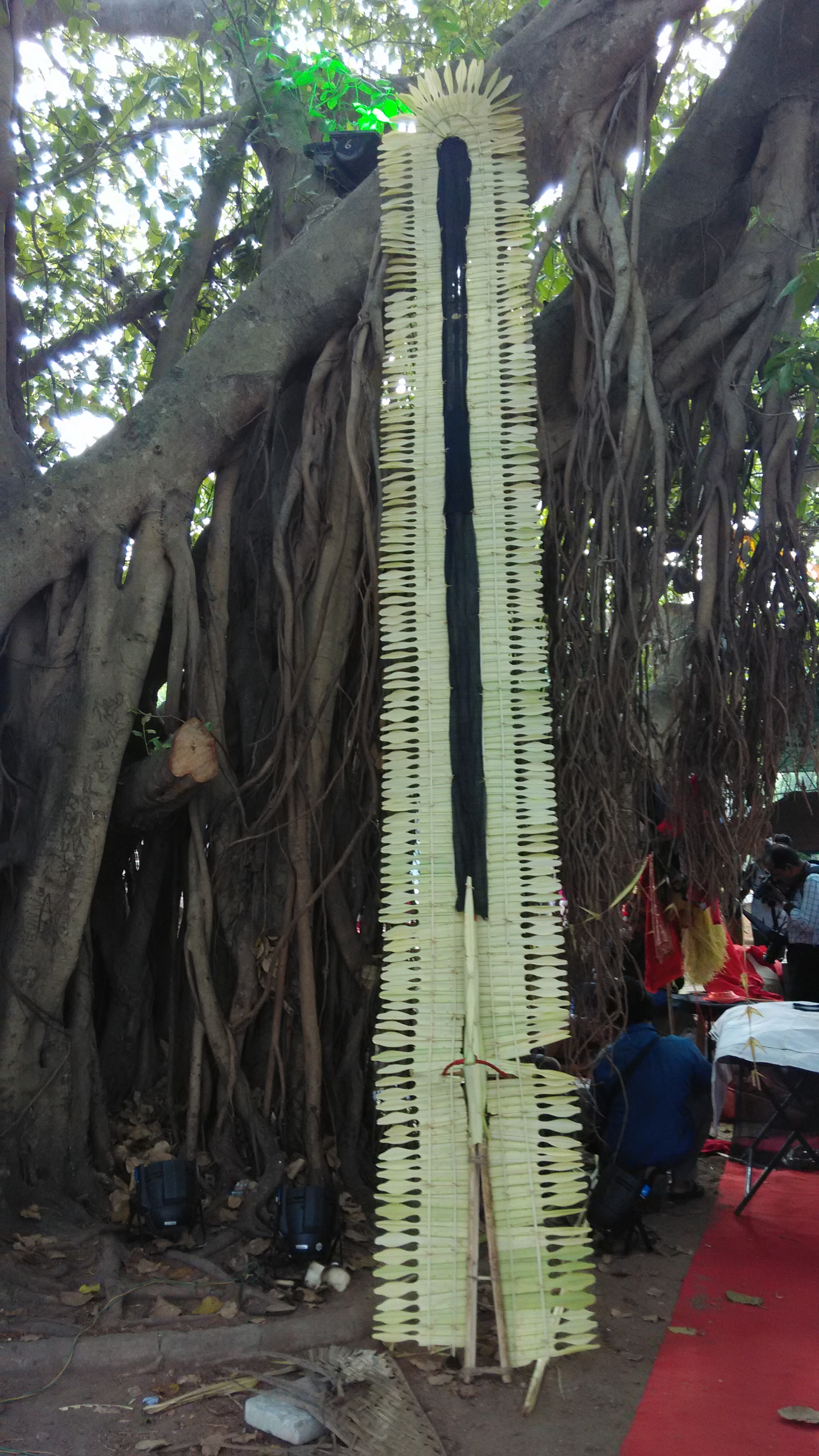 തെയ്യത്തിന്റെ മുടി - തലച്ചമയങ്ങളിലെ പ്രധാന ചമയം